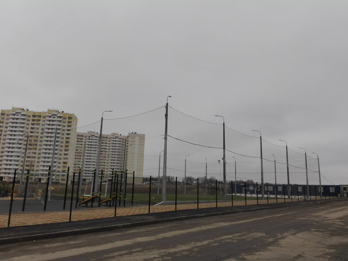 Вид на спорткомплекс «Суворов» в ЖК Суворовском.